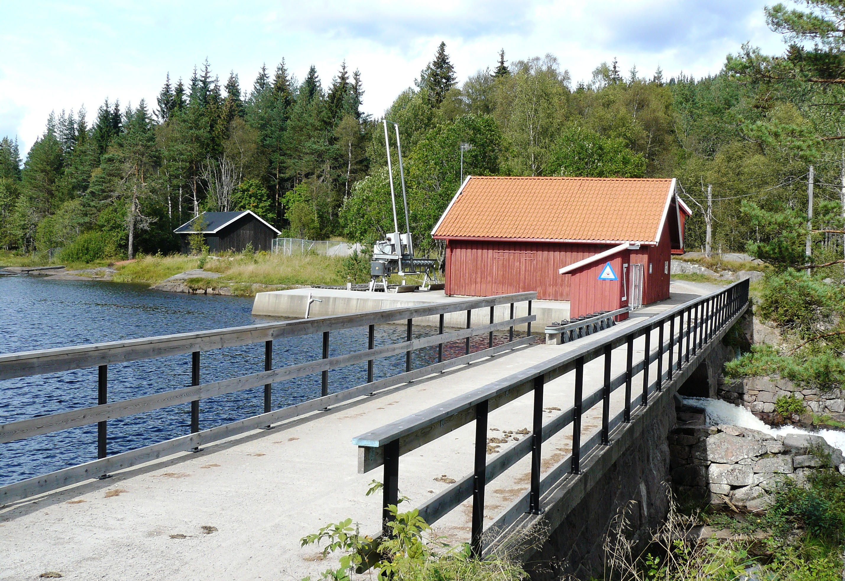 Skjærsjødammen, Nordmarka